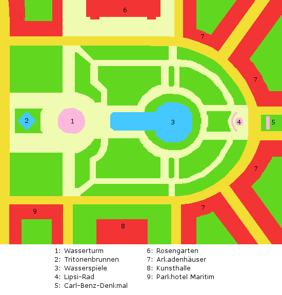 Friedrichsplatz in Mannheim